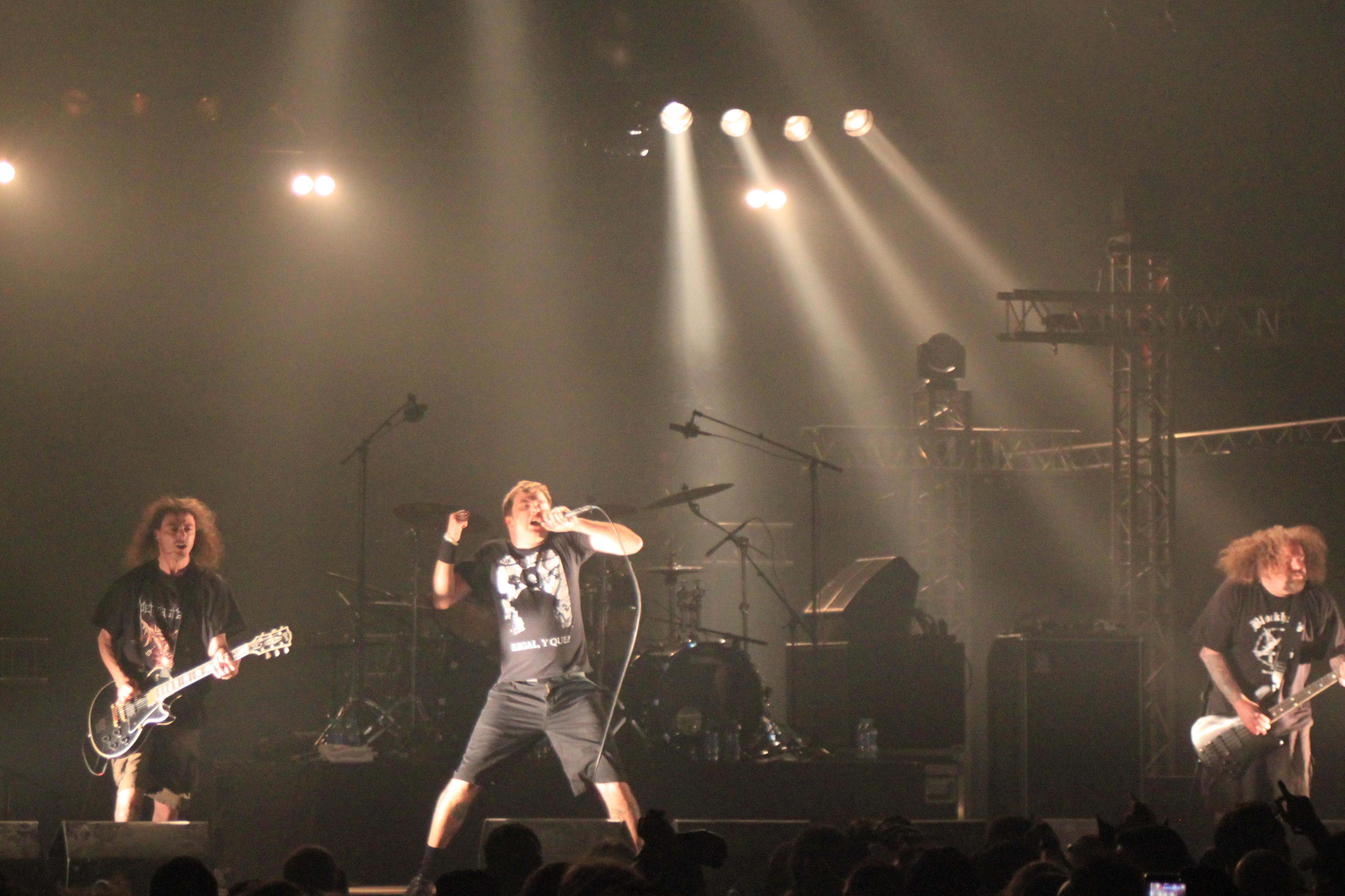 Napalm Death, Helfest 2013, Fr-44-Clisson.